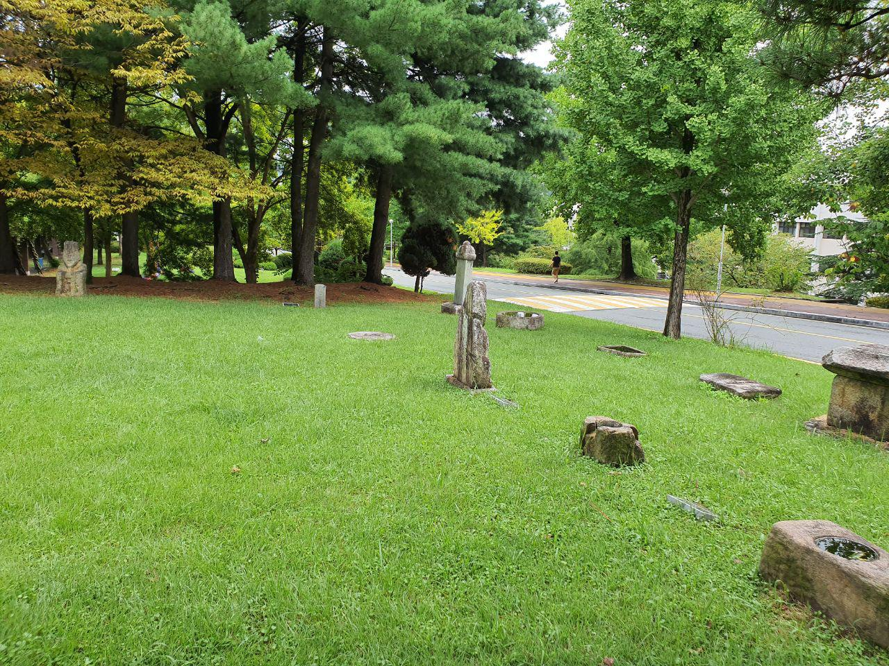 충남대학교 야외박물관 전경(2019)